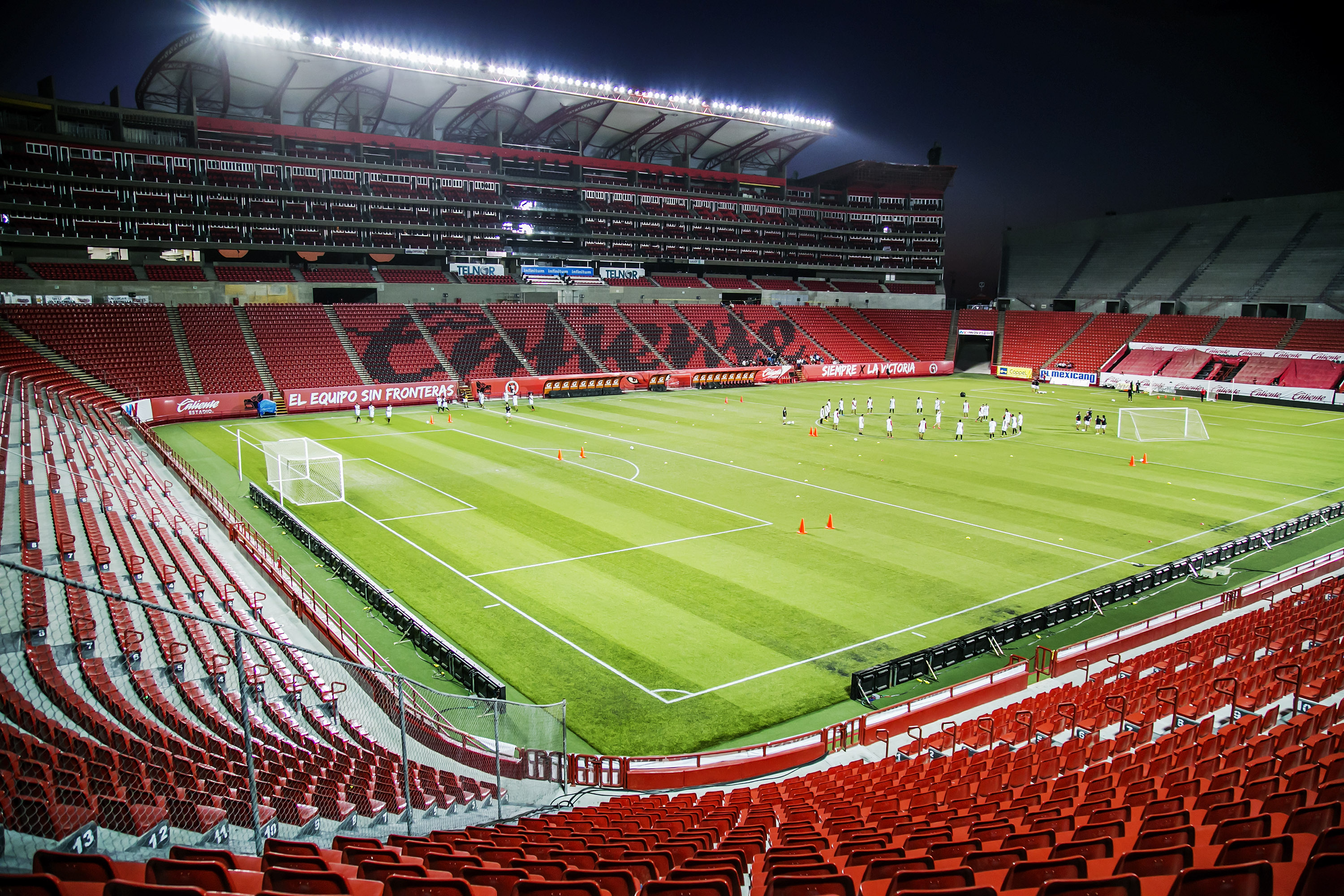 Estado actual de las instalaciones del Club